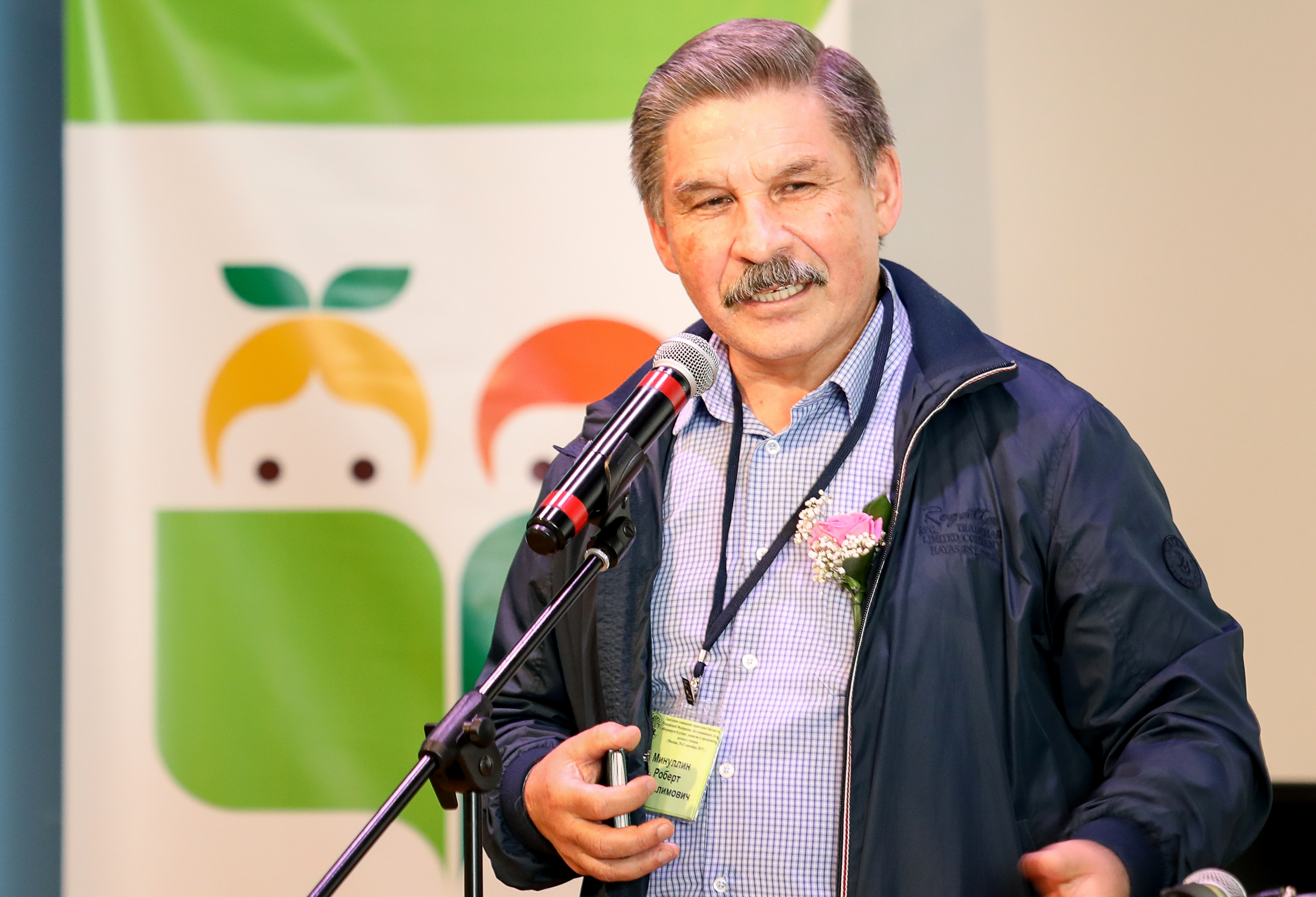 Роберт Мугаллимович Минуллин- советский и российский поэт, журналист. В Российской государственной детской библиотеке.